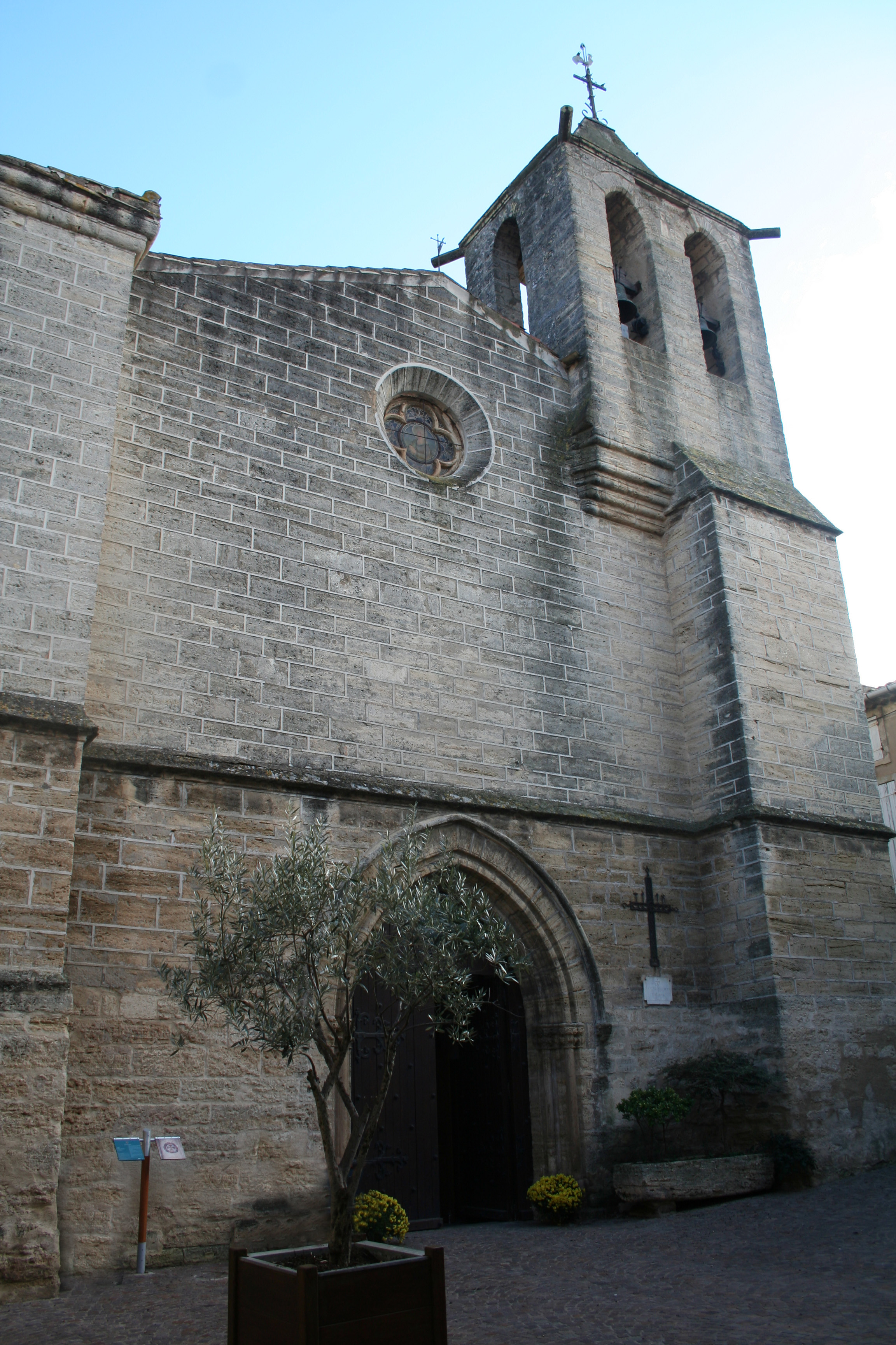 Valros (Hérault) - façade de l'église Saint-Étienne.